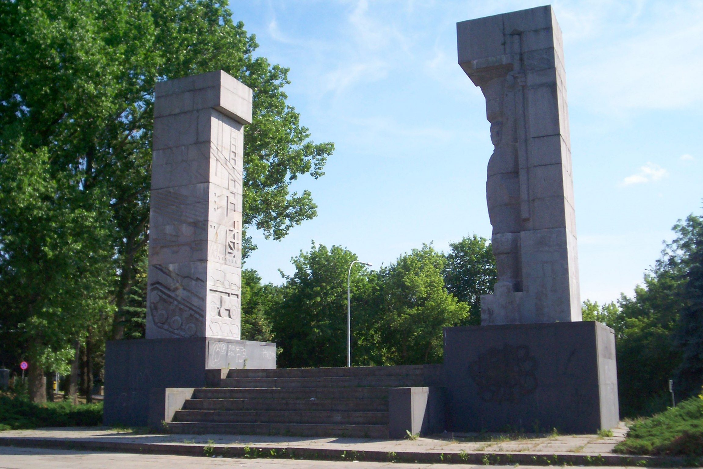 Pomnik Wyzwolenia Ziemi Warmińsko-Mazurskiej w Olsztynie